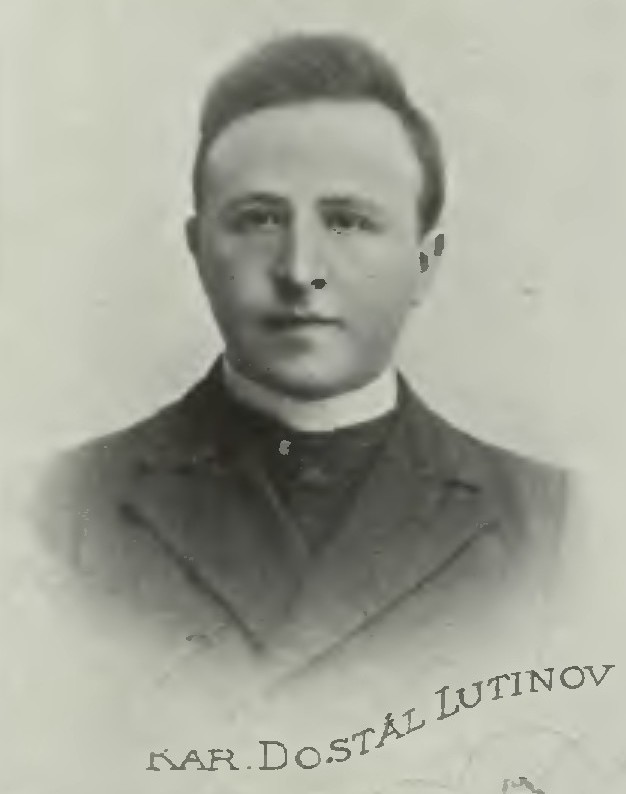 Portrét – Karel Dostál-Lutinov (1871-1923), Český katolický kněz, básník a spisovatel.